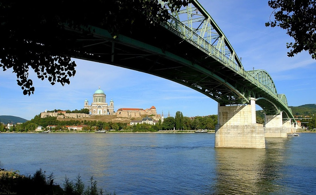 Az Esztergomi bazilika Párkány felől